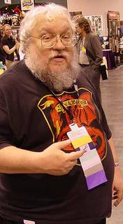 George R.R. Martin.